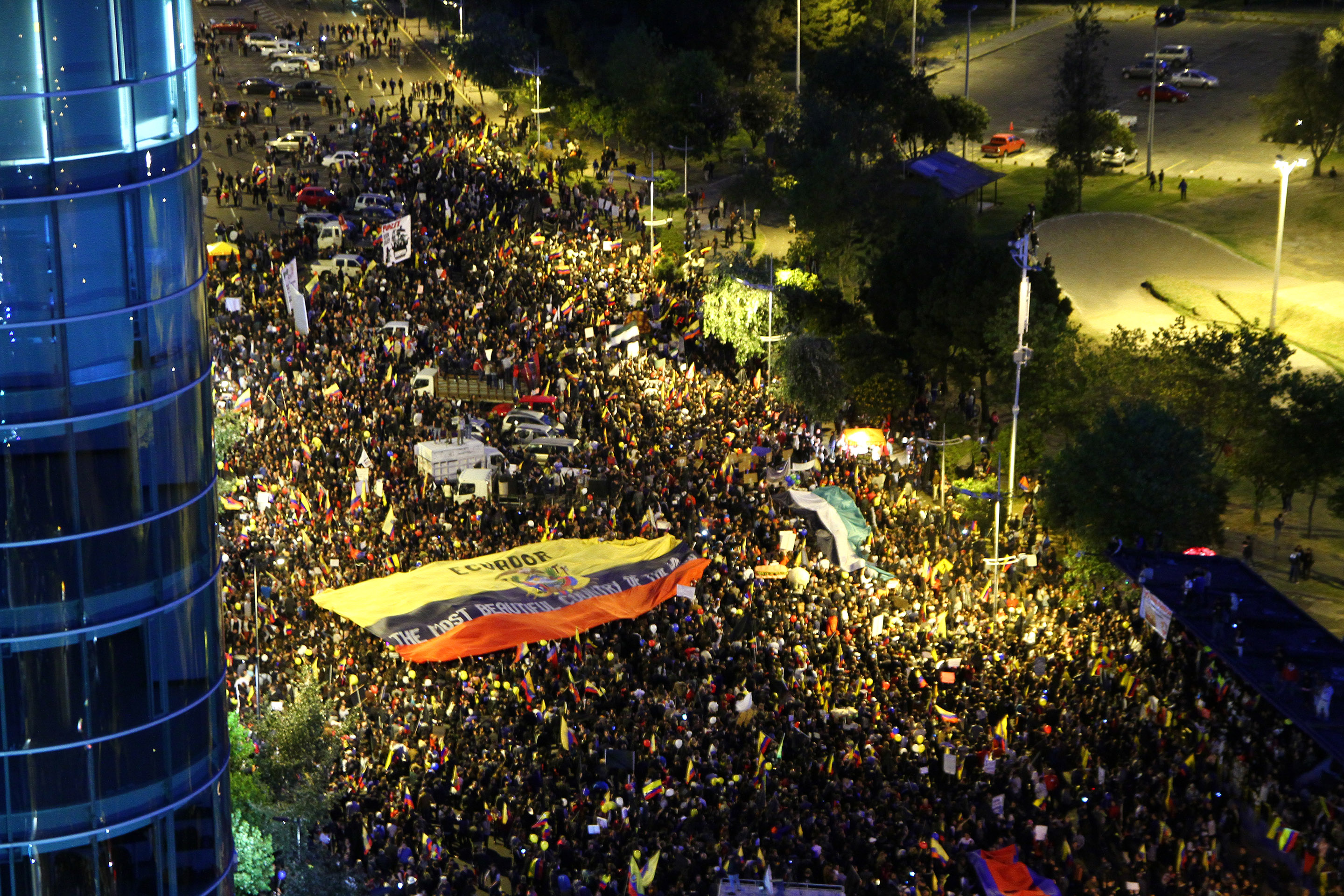 Protestas de la ciudadanía autoconvacada en contra de las políticas de gobierno del economista Rafael Correa Delgado, presidente de la República del Ecuador. Quito, avenda de los Shyris, jueves25 de junio de 2015.